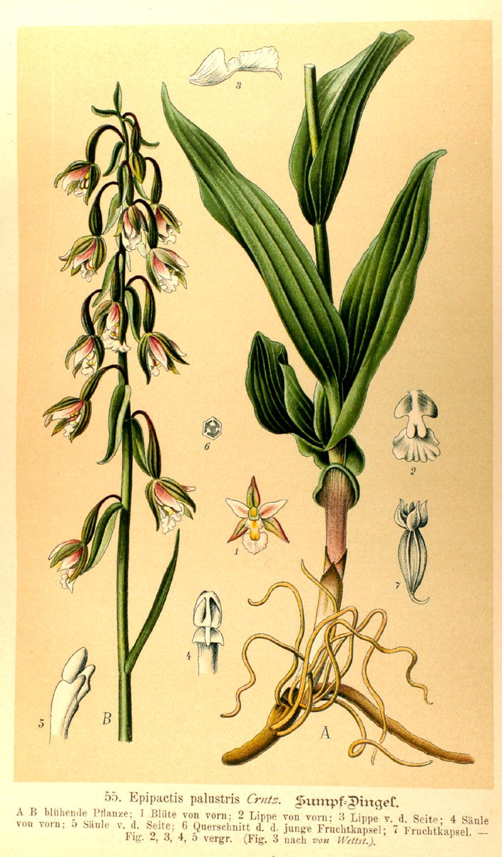 Epipactis palustris obrázek kruštíka bahenního ze starého německého herbáře zdroj